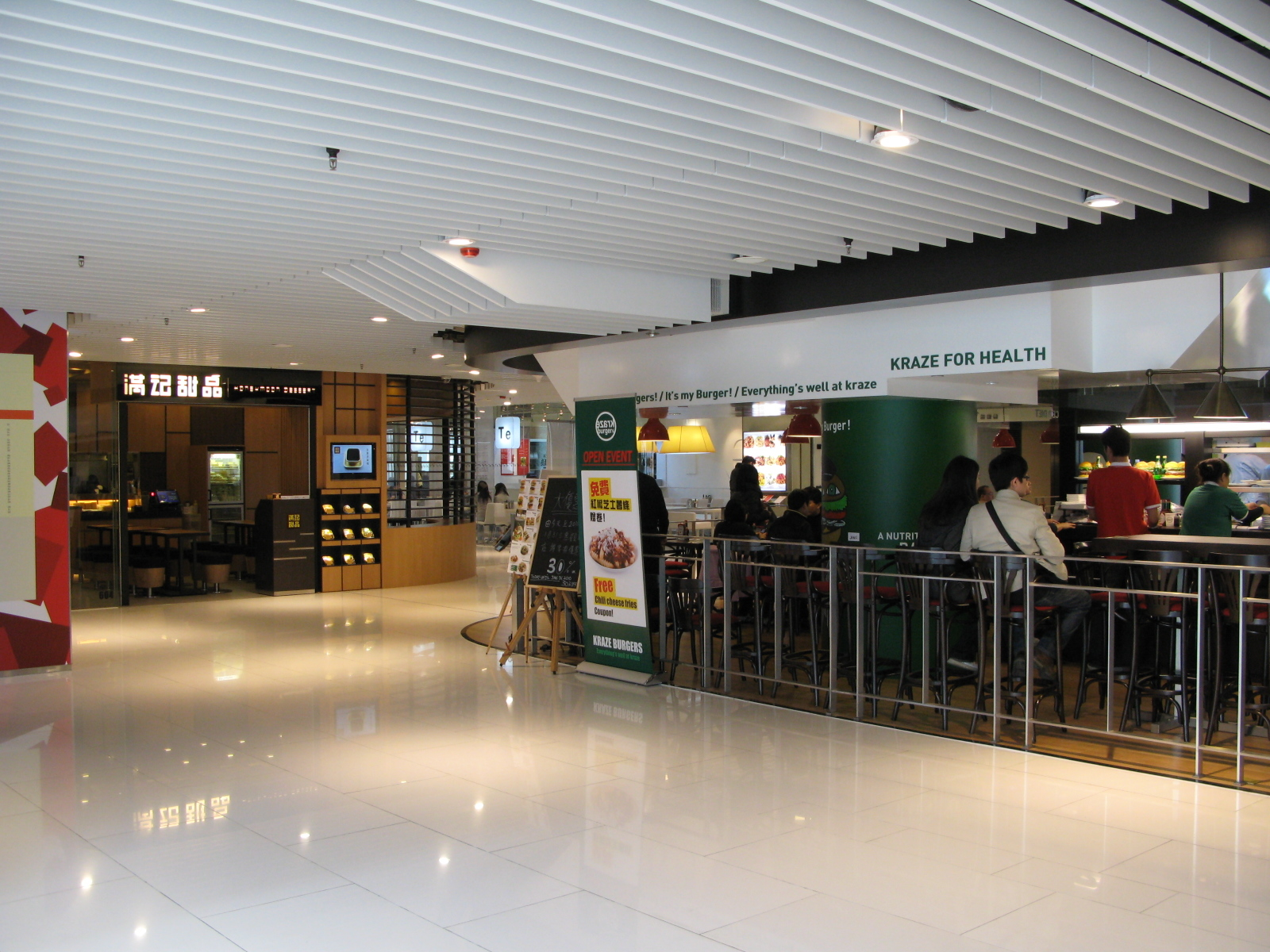 iSQUARE Level 6 Restaurants